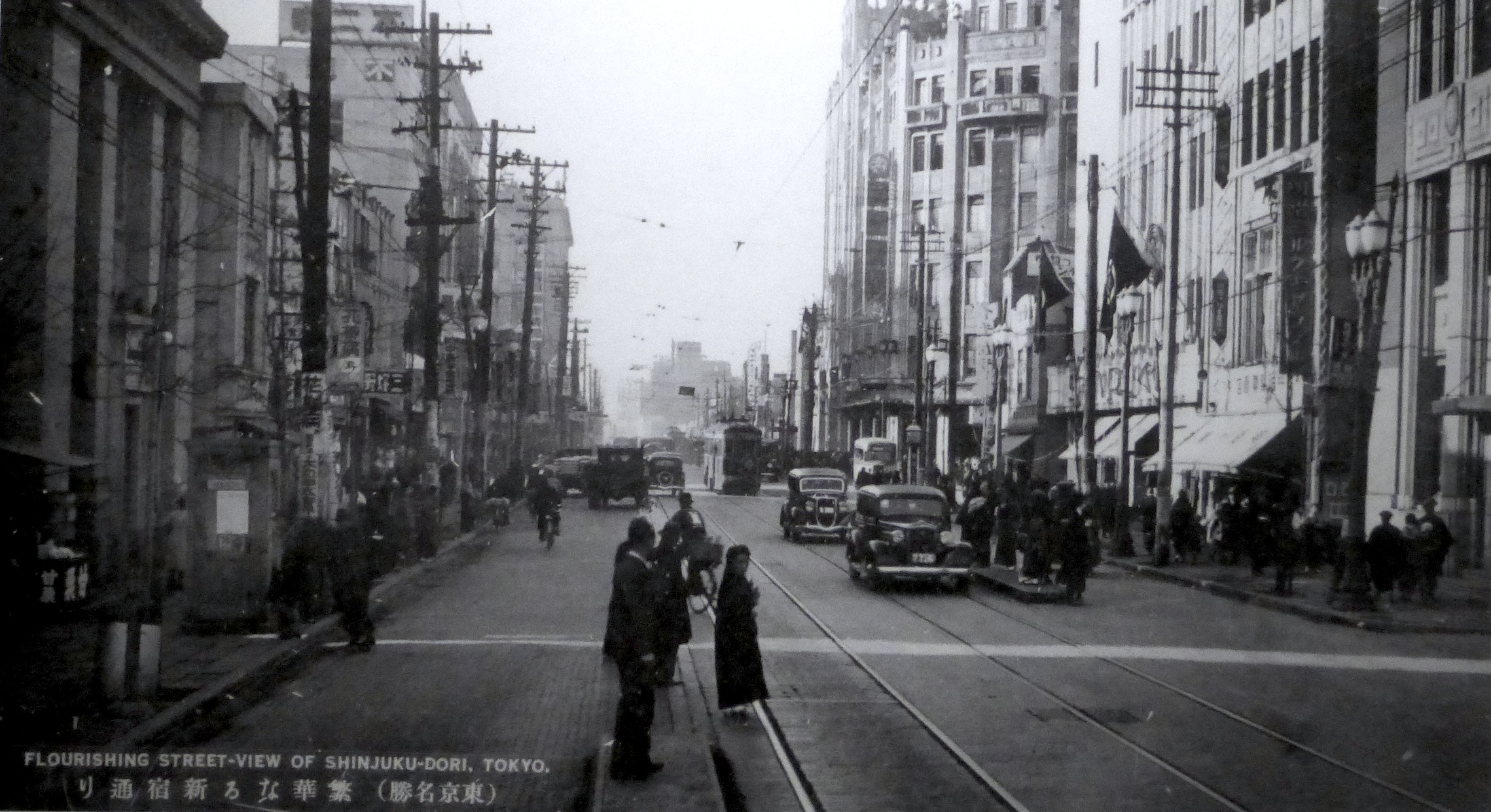 新宿通り (shinjuku-dori street)